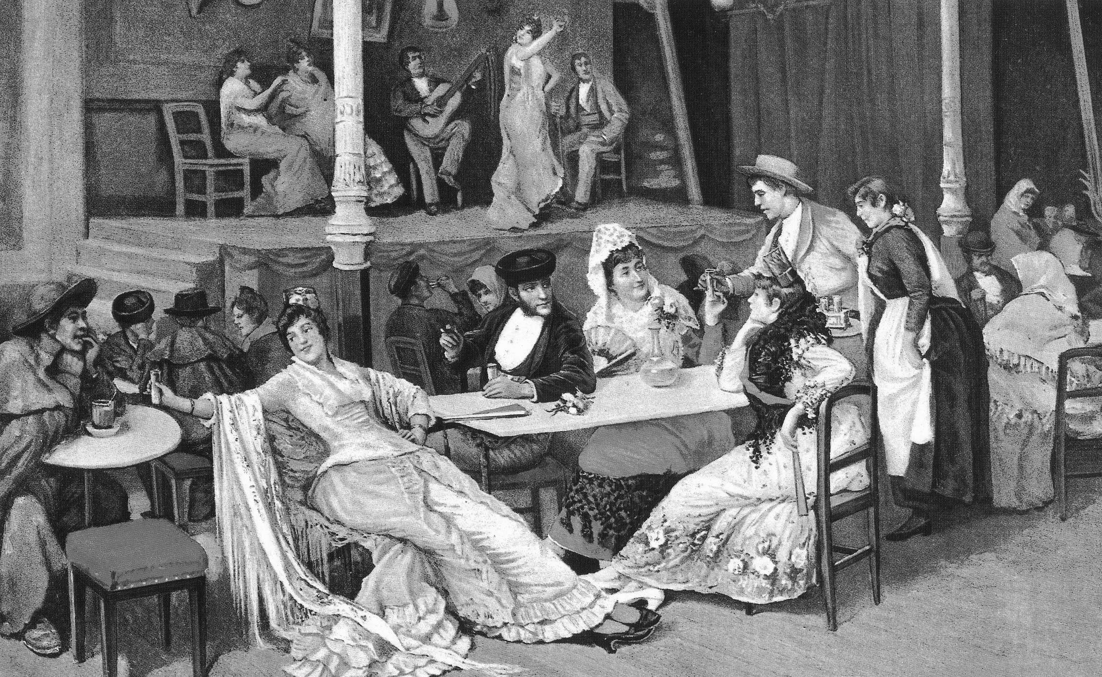 Un café cantante. Oleo de José Alarcón Suárez -circa 1850 date QS:P,+1850-00-00T00:00:00Z/9,P1480,Q5727902- [1]